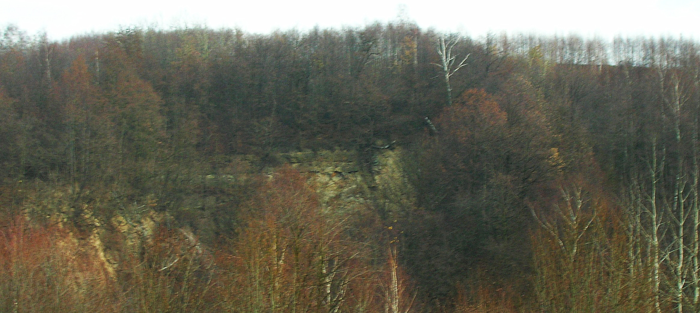 Stary Łom Zalas